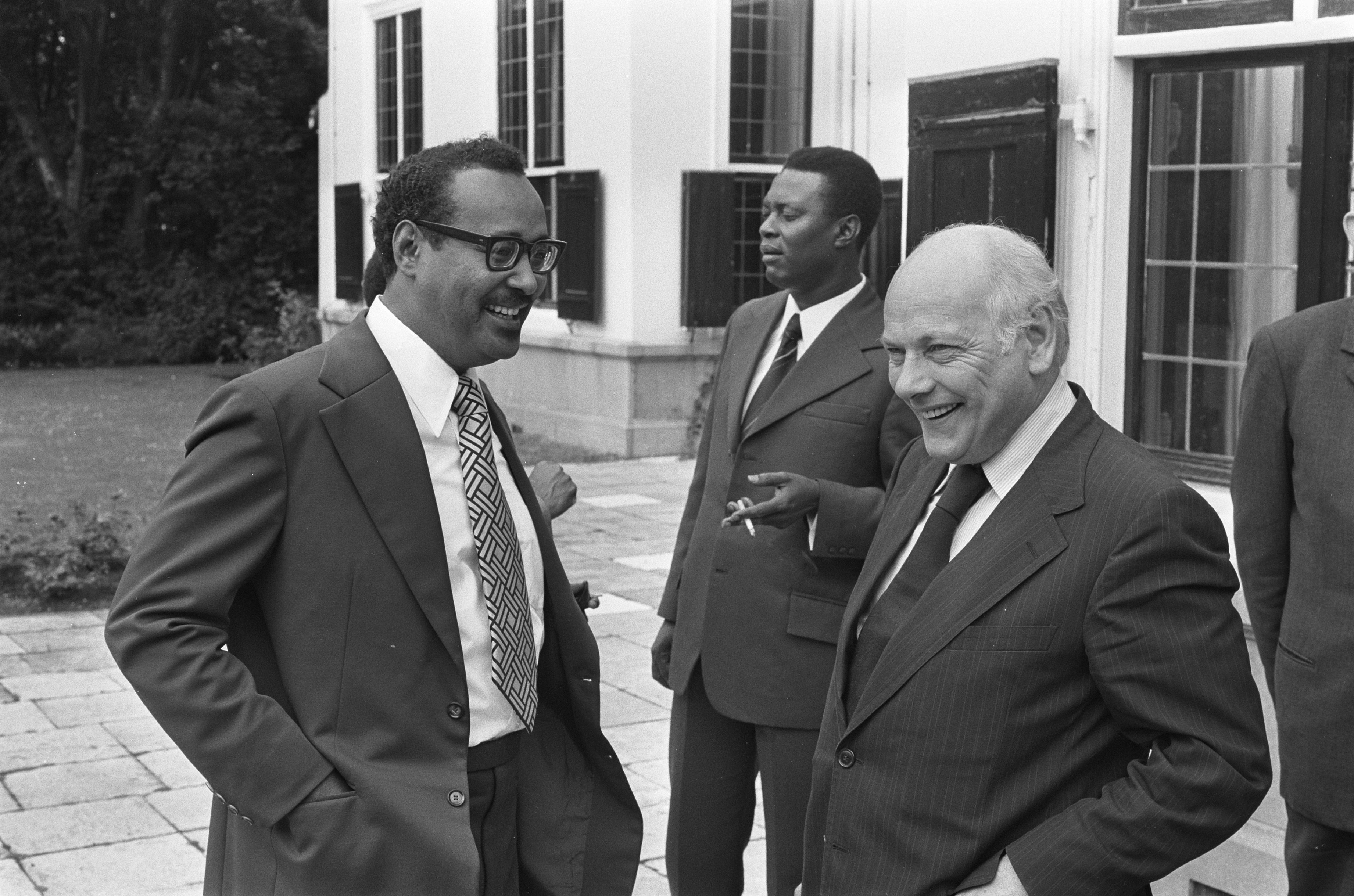 Collectie / Archief : Fotocollectie Anefo Reportage / Serie : Tweedaags overleg tussen regeringsdelegaties van Suriname en Nederland in het Catshuis Beschrijving : Den Uyl in gesprek met Arron Datum : 25 juni 1975 Locatie : Den Haag, Zuid-Holland Trefwoorden : minister-presidenten Persoonsnaam : Arron, Henck, Uyl, Joop den Fotograaf : Fotograaf Onbekend / Anefo Auteursrechthebbende : Nationaal Archief Materiaalsoort : Negatief (zwart/wit) Nummer archiefinventaris : bekijk toegang 2.24.01.05 Bestanddeelnummer : 928-0121